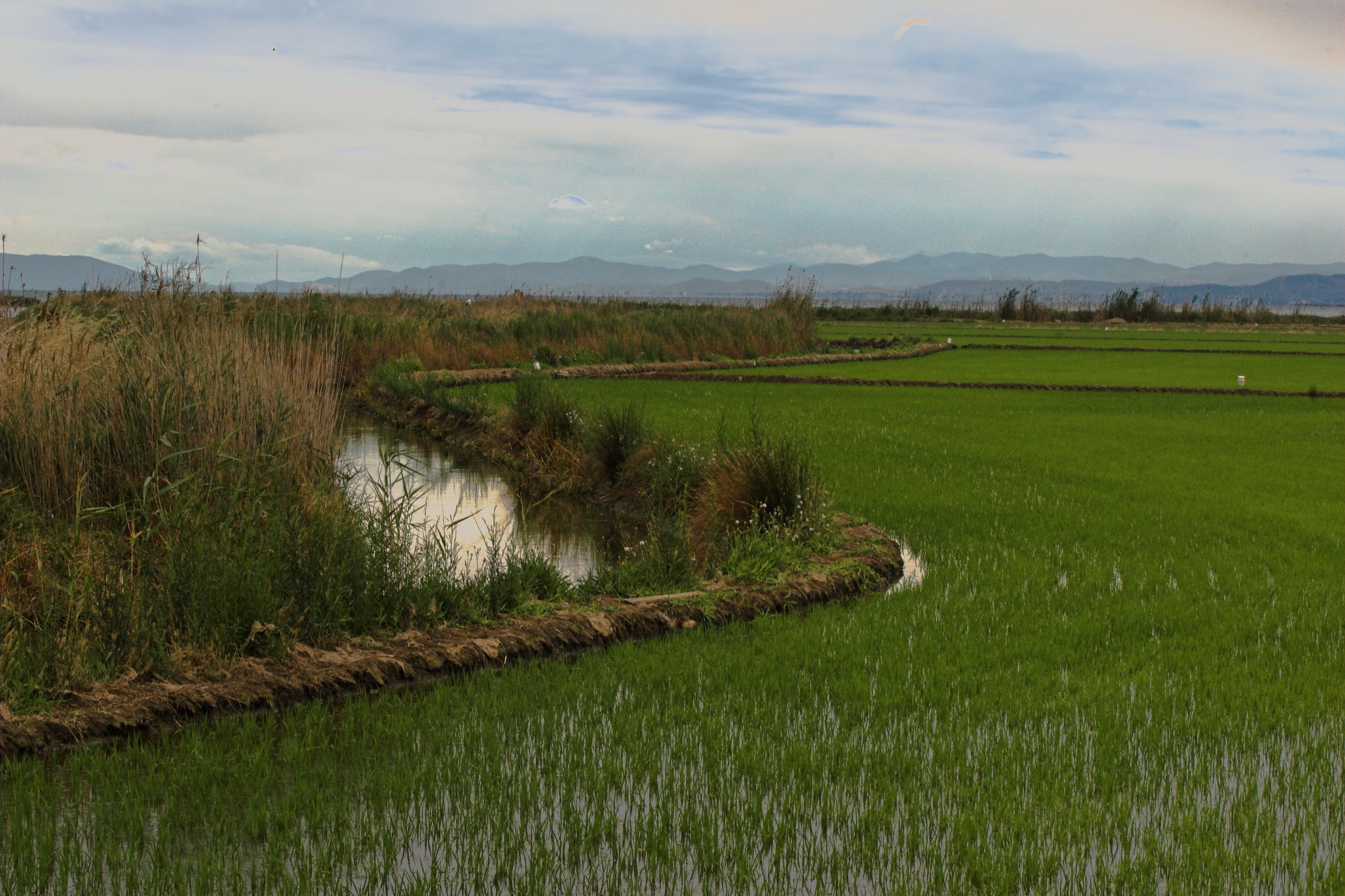 Delta de l'Ebre This is a a photo of a natural area in Catalonia, Spain, with id: ES510102